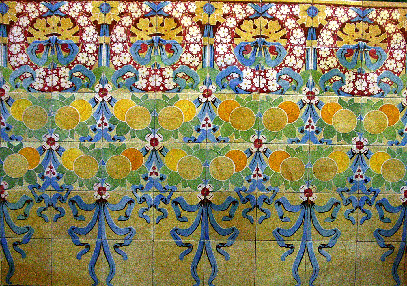 Casa Jaume Gustà a Barcelona (Catalunya), obra de 1910. Detall dels arrambador, obra de la fàbrica Pujol i Bausis, segons disseny de Lluís Bru